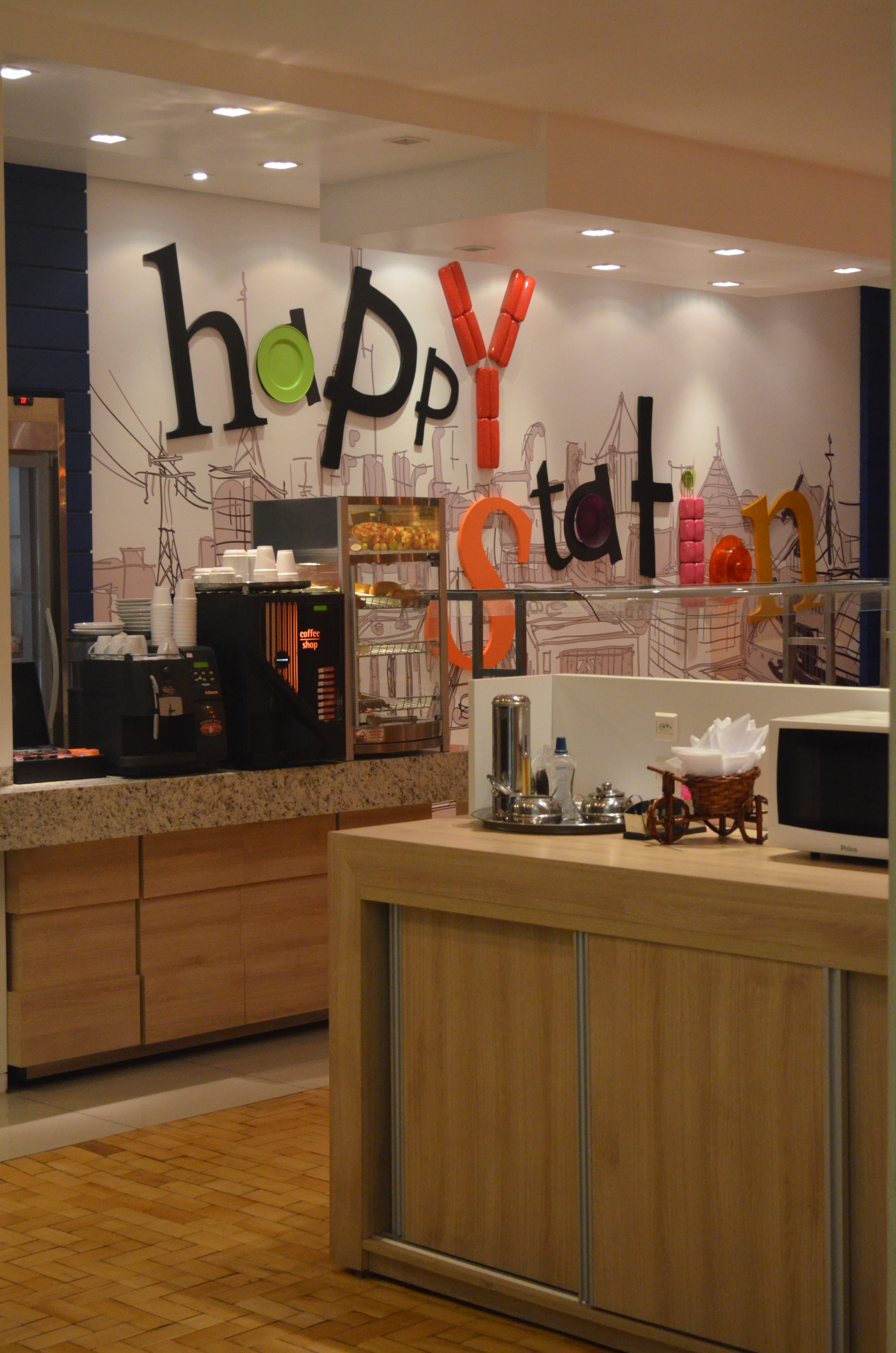 Happy Station, lancheria do Campus da Unisinos Porto Alegre